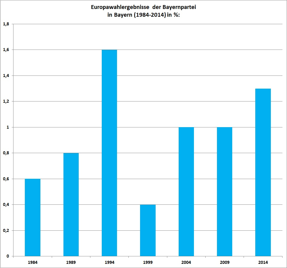 Bayernpartei Europwahlergebnisse in Bayern